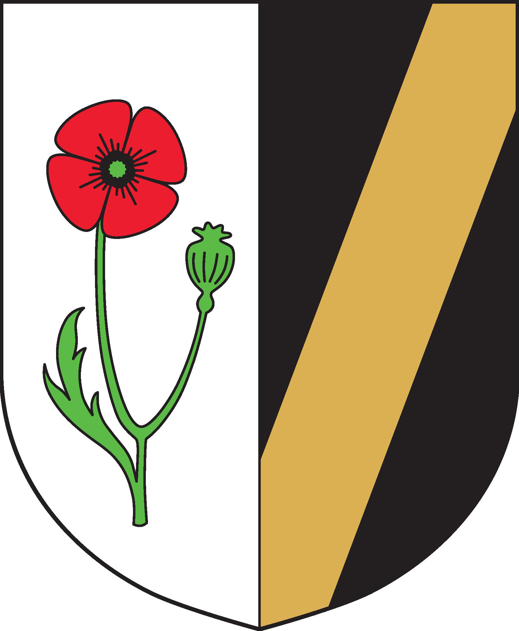 Útěchovice znak